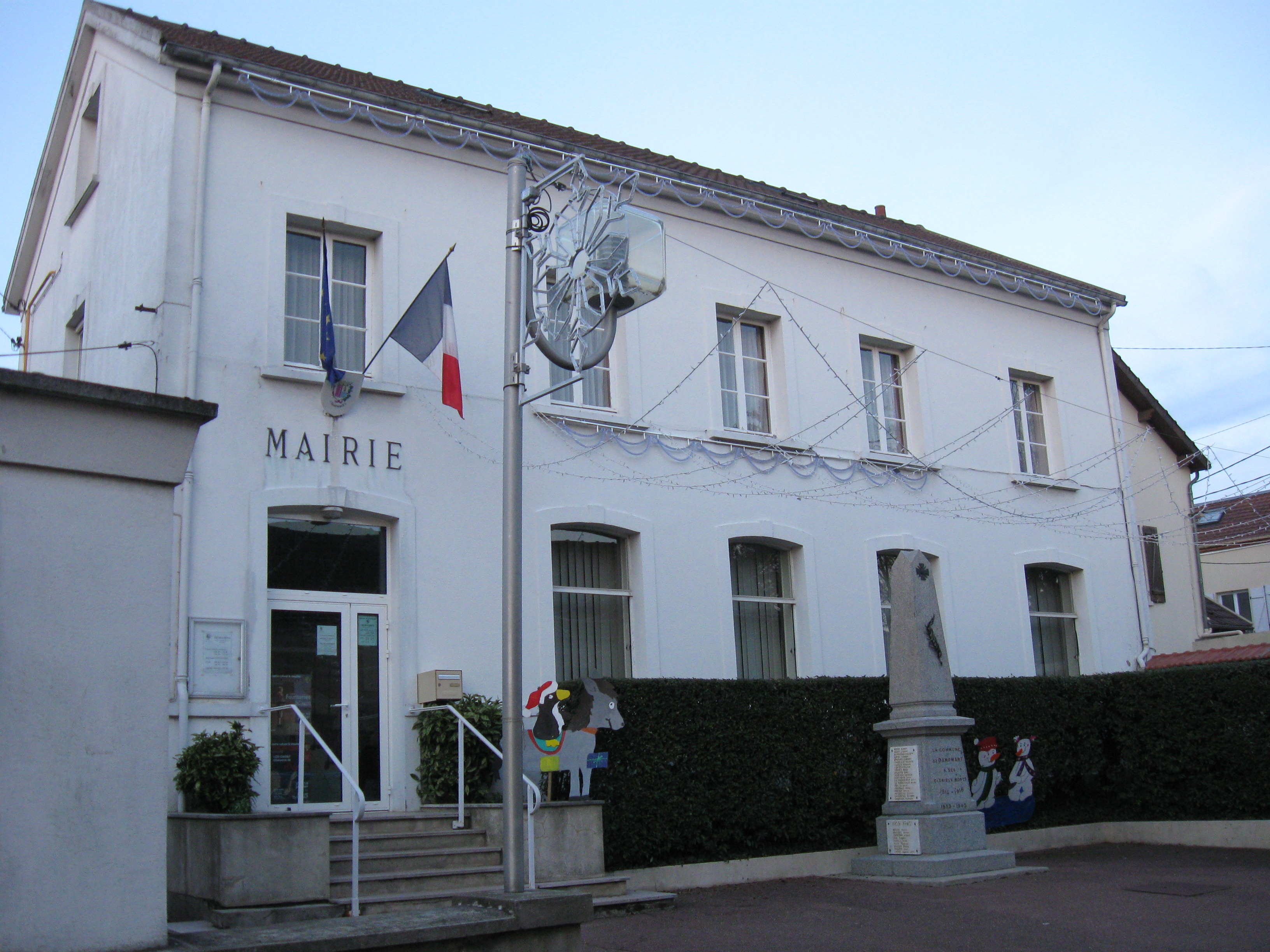 Mairie de Dampmart. (Seine-et-Marne, région Île-de-France).